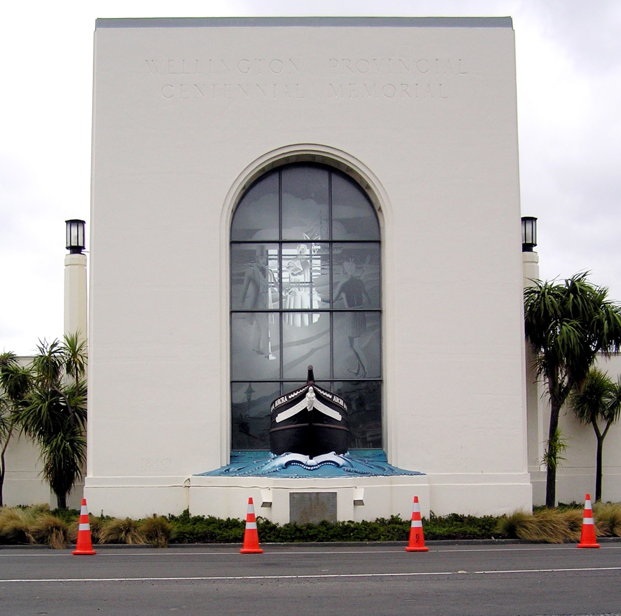 Settler's Museum Petone